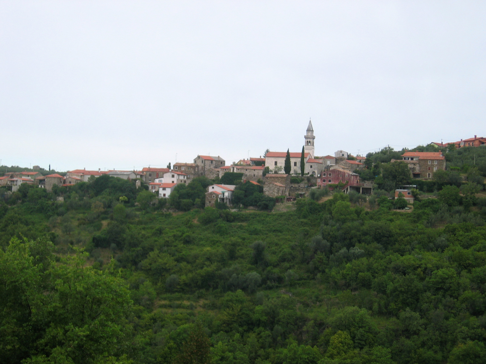 Krkavče, village in slovenian Istra